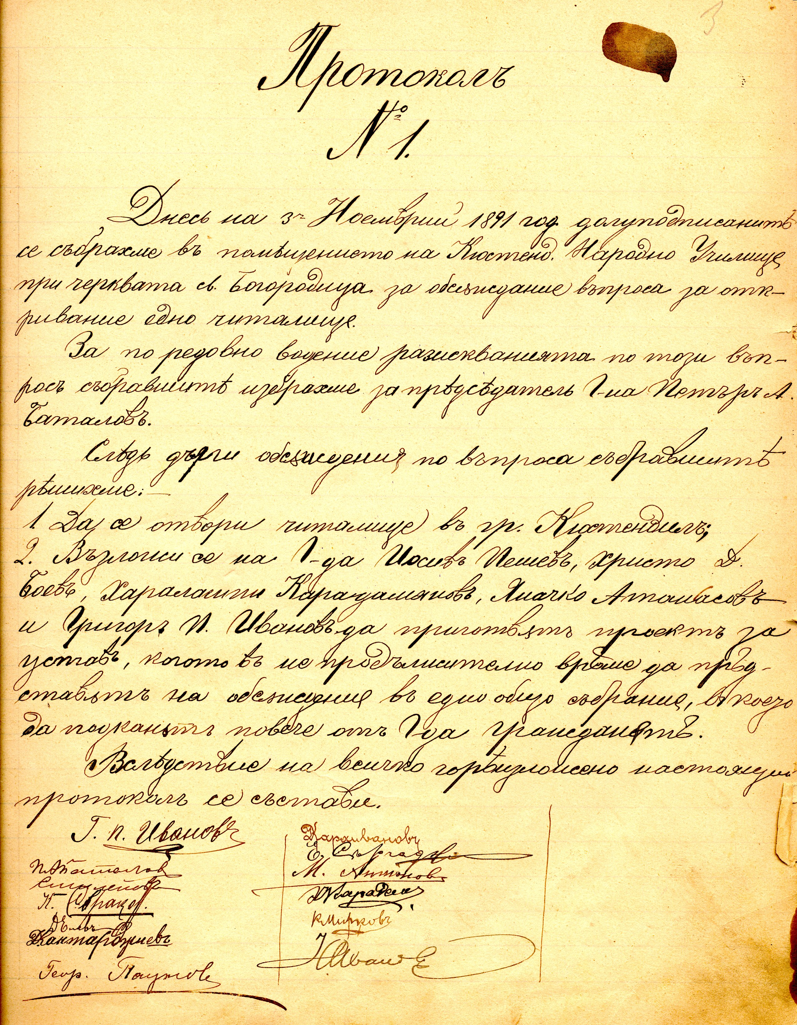 Учредителен протокол на читалище Братство - Кюстендил